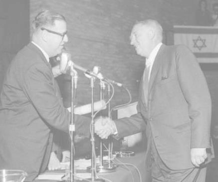 אריה שרון מקבל פרס ישראל 1962 צלם יהודה איזנשטרק גנזך המדינה